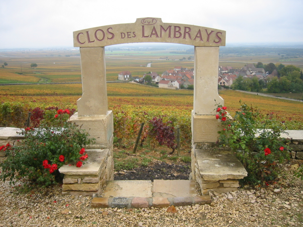 Clos des Lambrays - Grands Crus de Bourgogne